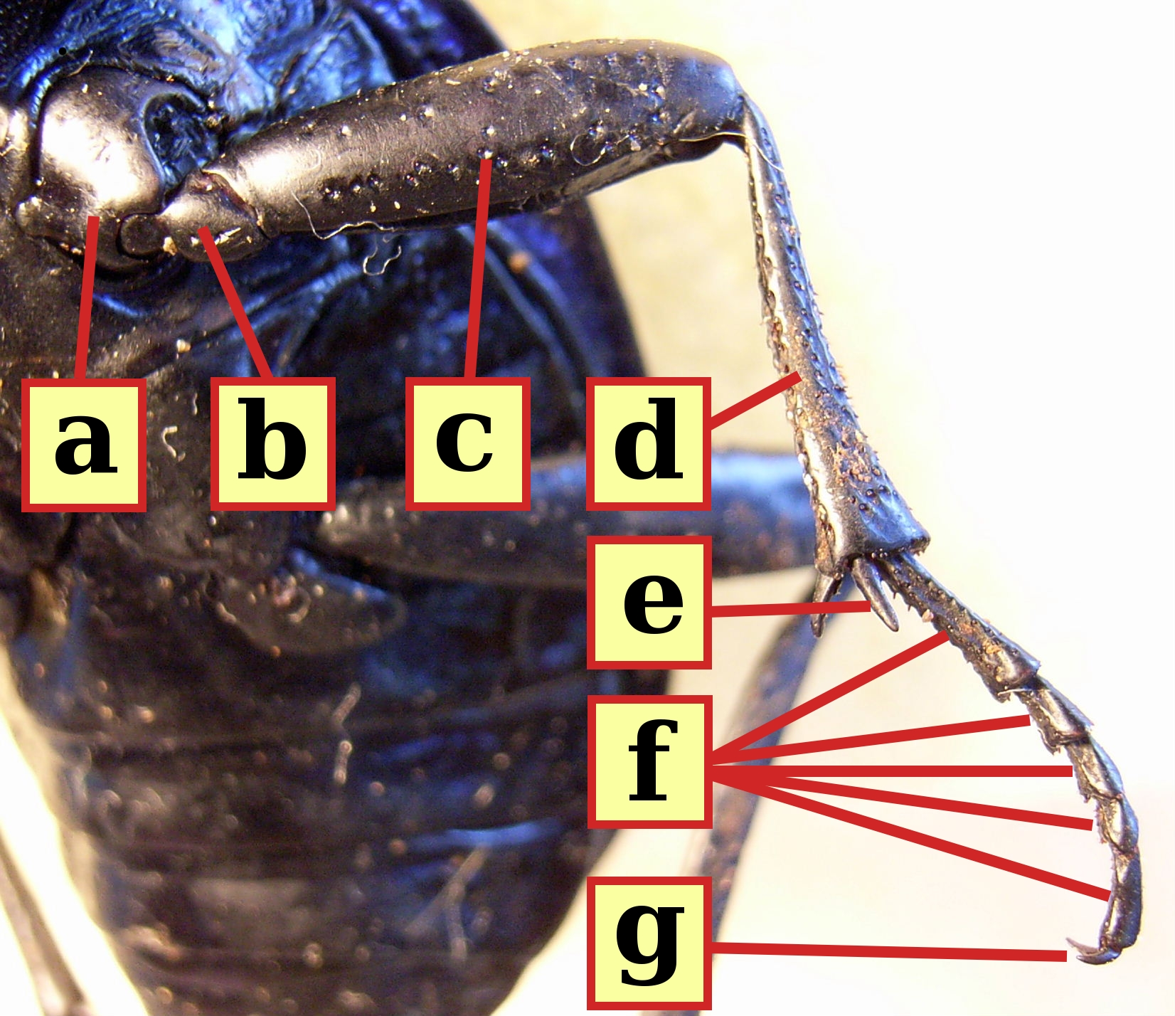 see legend below